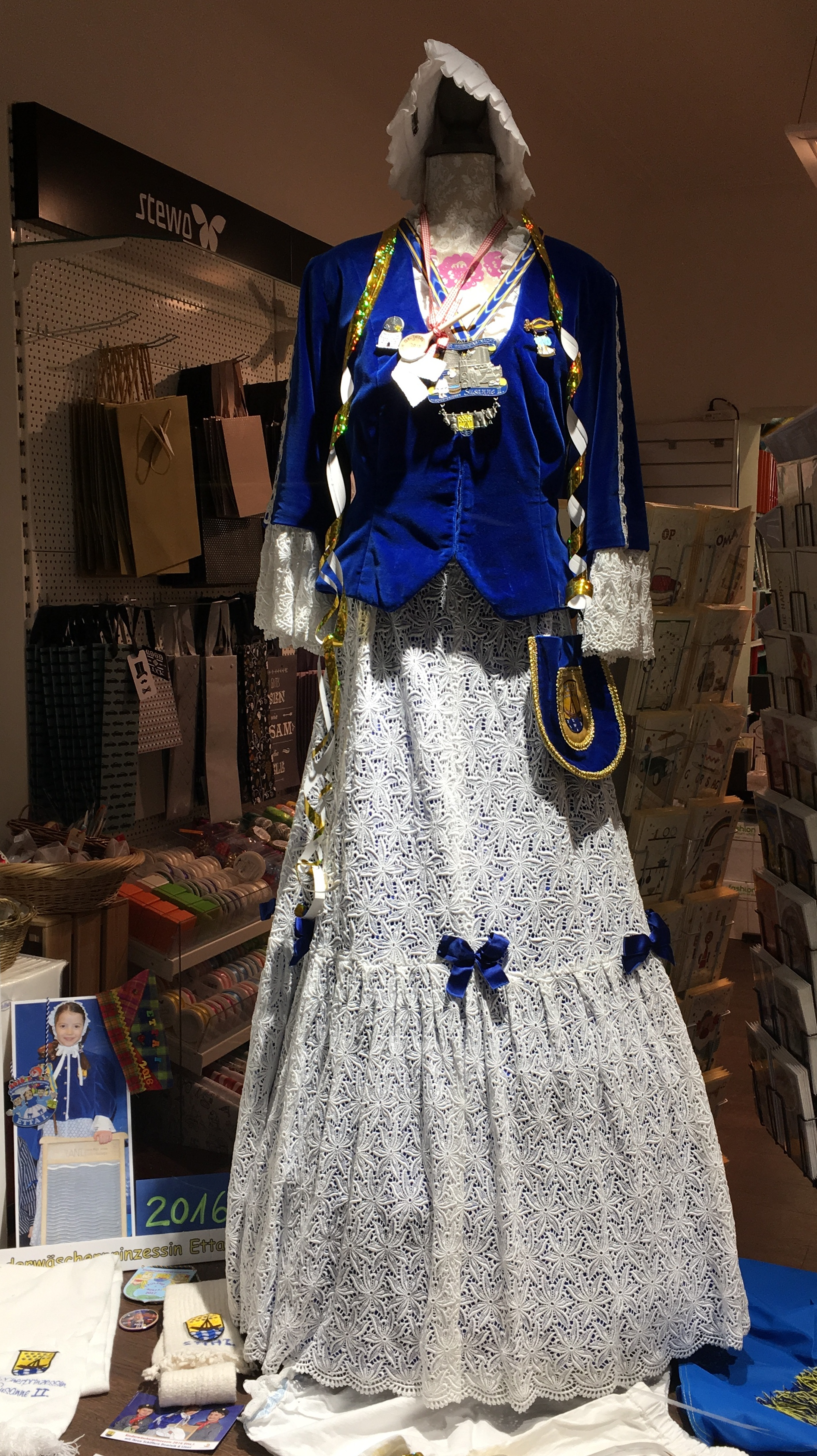 Exponat im Schaufenster einer Schreibwarenhandlung in Bonn-Beuel: Ornat der Beueler Wäscherprinzessin; eine Hauptfigur des Karnevals in Bonn-Beuel